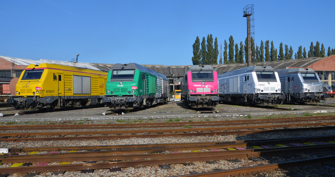 BB 75077 infra, BB 75462 Fret, BB 75015 OSR, BB 75022 ETF, BB 75031 AKIEM à Longueau, Présentation réalisé lors de la 2ème fête du rail dans le dépôt SNCF de Longueau